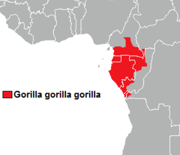 an edited version of the general distribution range map previously featured in wikipedia